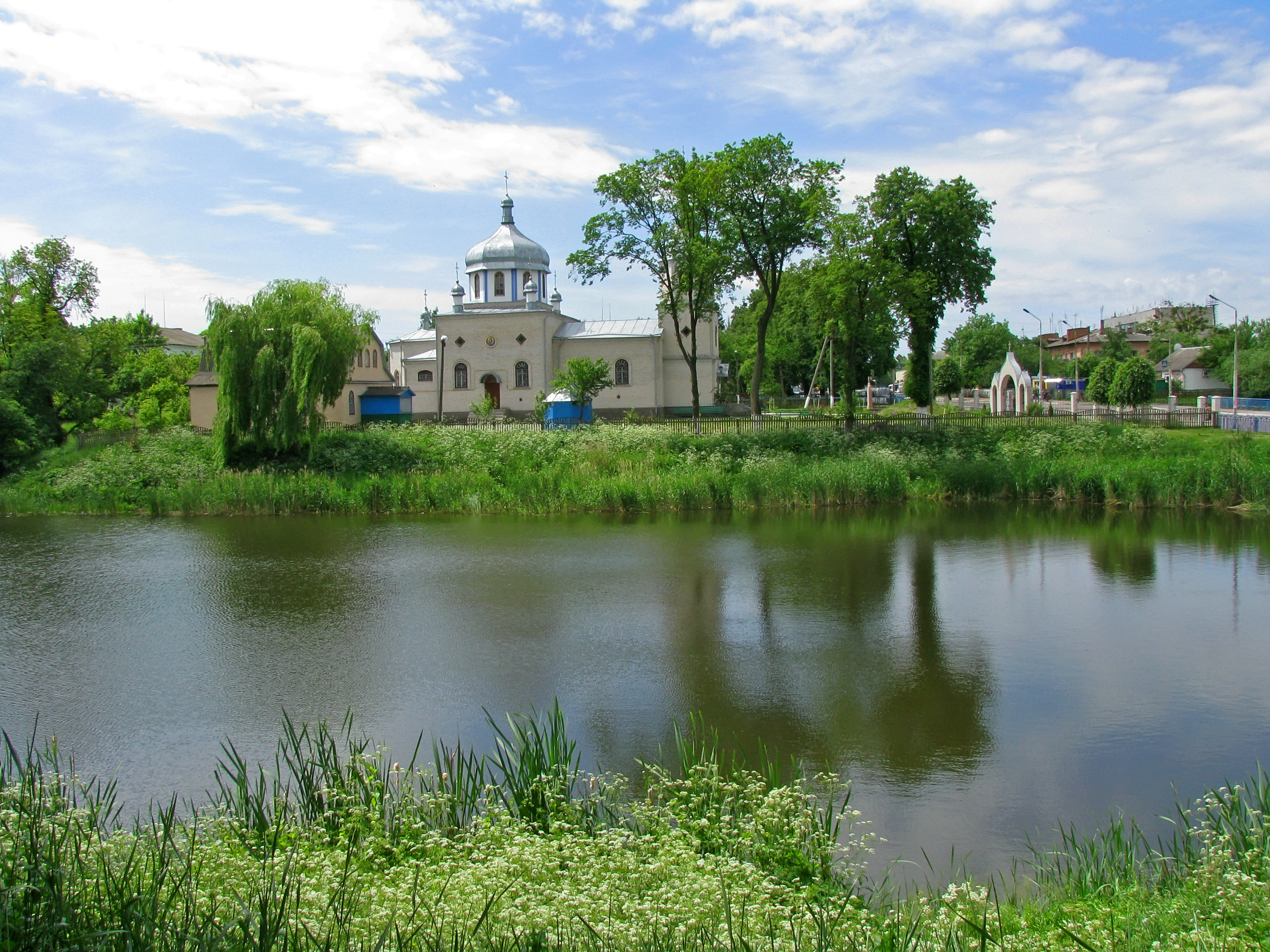 Андру-шівський, Андрушівський р-н, м. Андрушівка